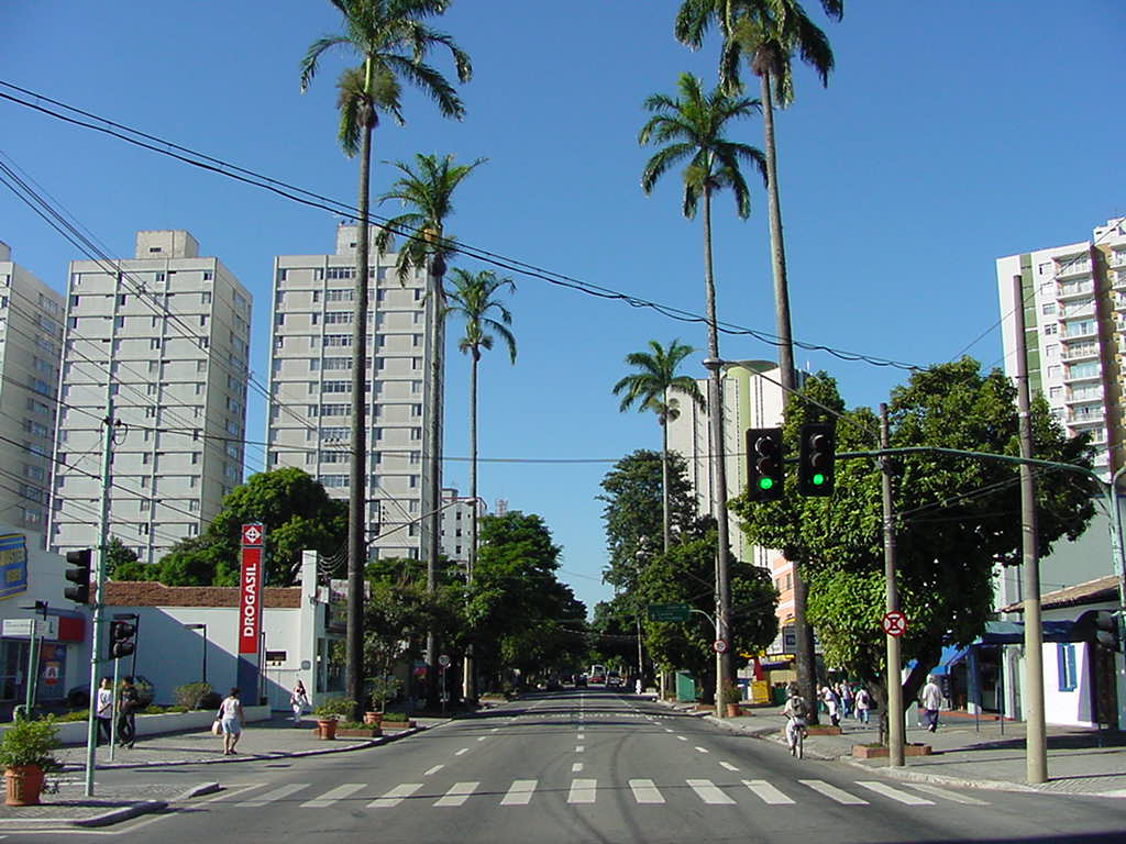 Centro